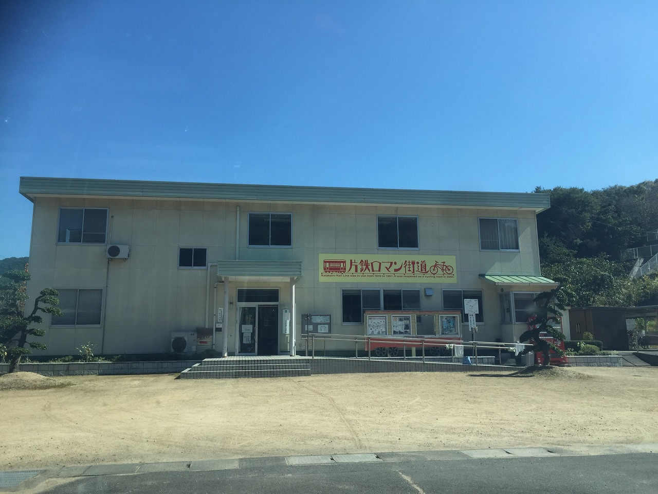 片山ロマン街道のサイクルステーション 岡山県道703号備前柵原自転車道線 旧同和鉱業片上鉄道 岡山県